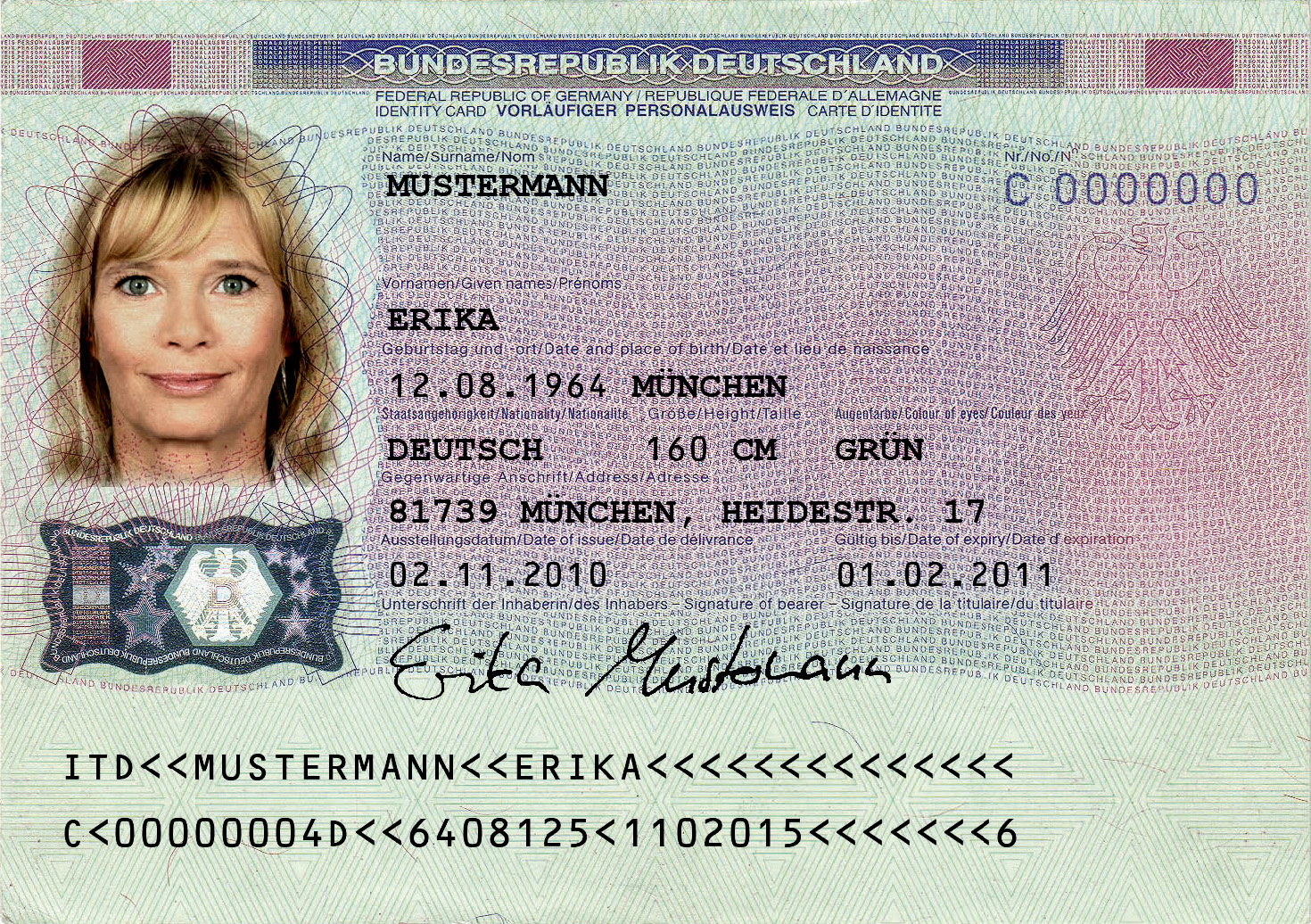 Muster des deutschen vorläufigen Personalausweises, Vorderseite